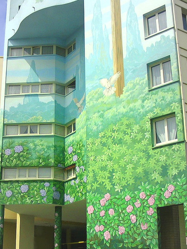 Drancy - Trompe l'œil située dans le quartier Drancy Centre entre la rue Jean Jaurès et la rue de la République.